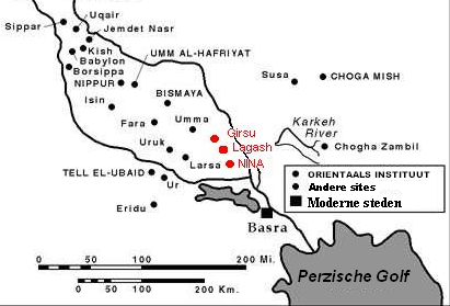 Aangepaste versie van Image:Lagash.png.